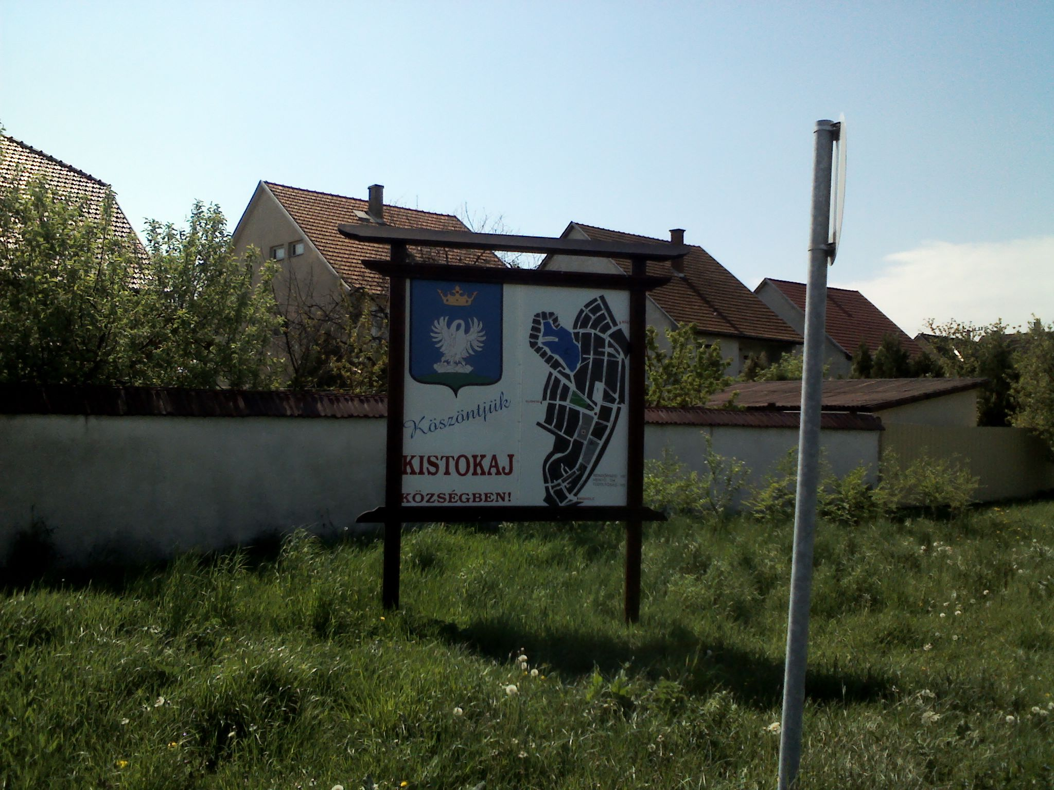 Aviso de Bienvenida en húngaro al municipio de Kistokaj